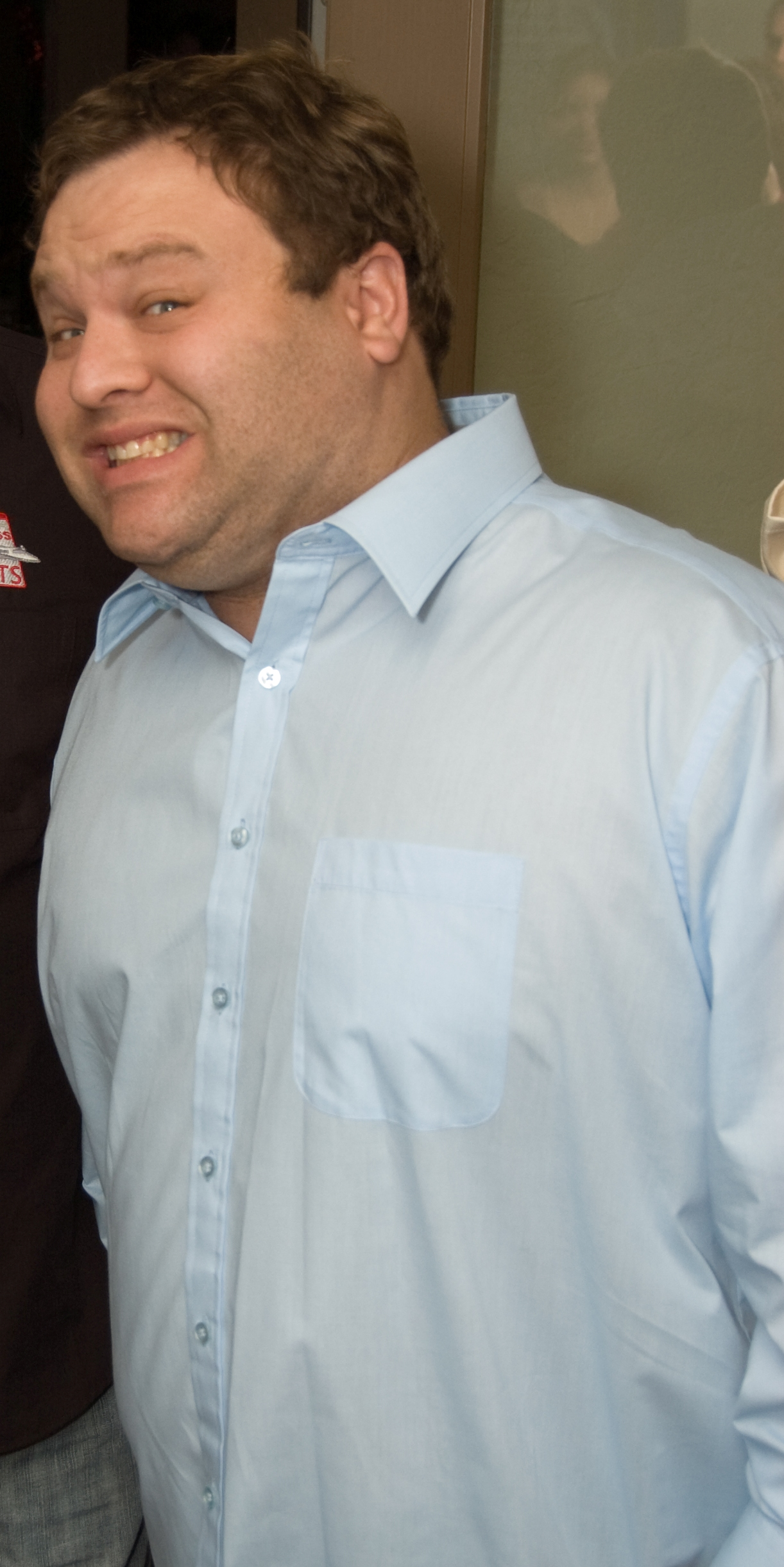 Frank Caliendo in Arizona in December 2008